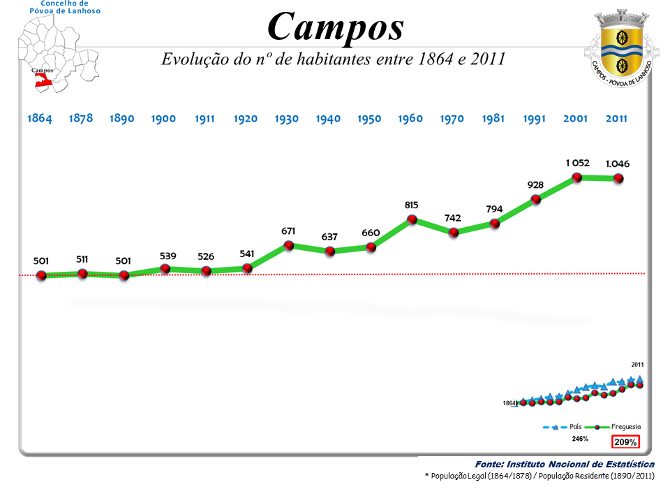 Censos 1864/2011